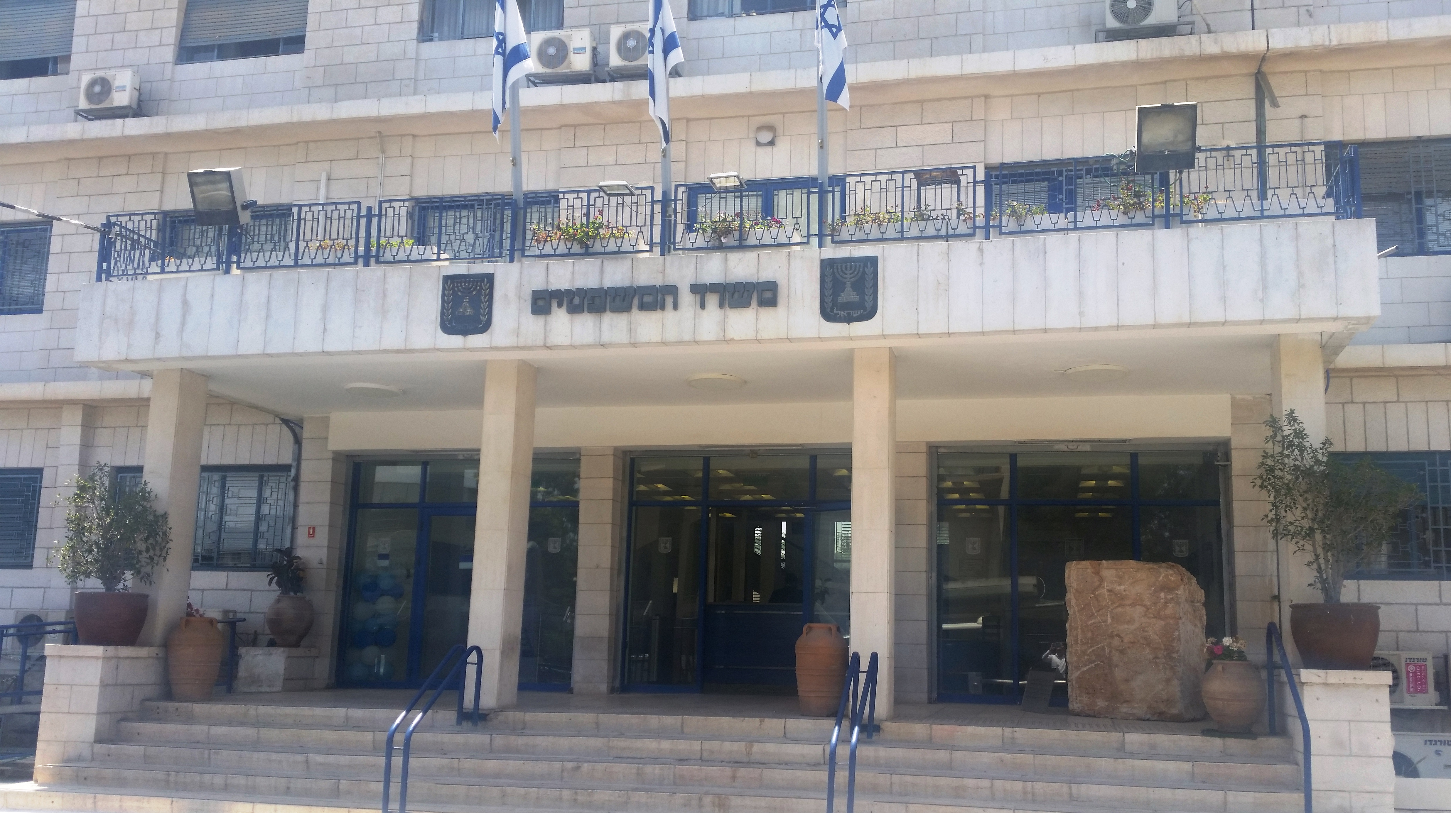 בניין "יעוץ וחקיקה" בירושלים